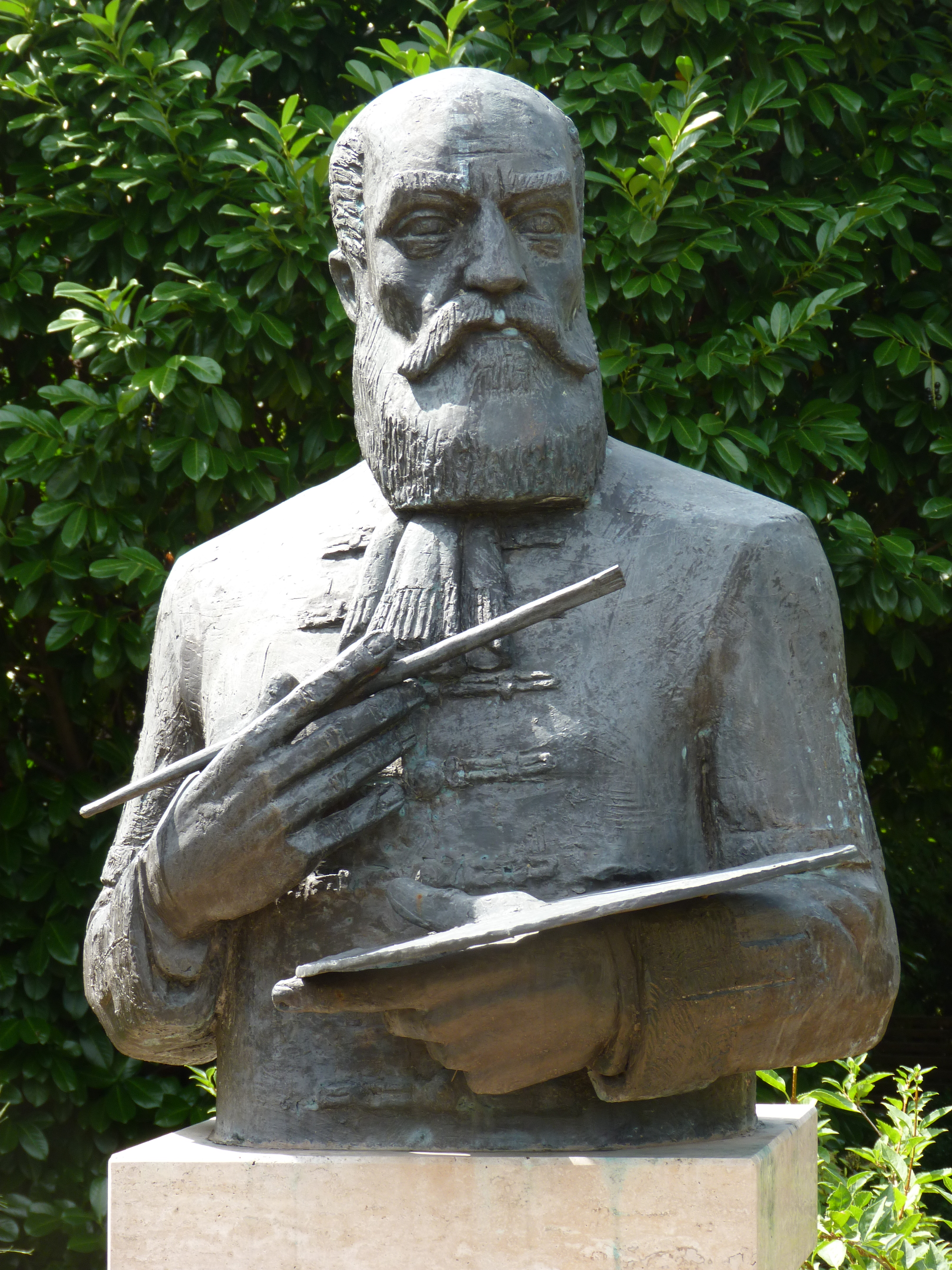 A felvétel 2014. augusztus 15-én pénteken készült Budapesten. Barabás Miklós (1810-1898) udvarháza. A mai Városmajor utca 44 szám alatti telket, melyen szőlő volt, présház és egy pince Barabás Miklós festőművész vásárolta meg 1839-ben. Az épület 1840-ben épült Barabás tervei alapján. Eleinte nyári lakként használta. Többször vendégeskedett itt Liszt Ferenc, Bajza József és József nádor is. Felújította Budapest Hegyvidék Önkormányzata 2000-2003 között, Basa Péter építész tervei alapján. Források: Udvarház tájékoztató ©© Derzsi Elekes Andor, Budapest 2014, You are authorised to use these photos and vids under Creative Commons – even for commercial, for profit purposes. Photos must be attributed to Derzsi Elekes Andor. All of the photos and vids in the Metapolisz DVD line are under Creative Commons and can be used even for commercial – for profit – purposes. Recommended Citation Derzsi Elekes Andor: Metapolisz DVD line